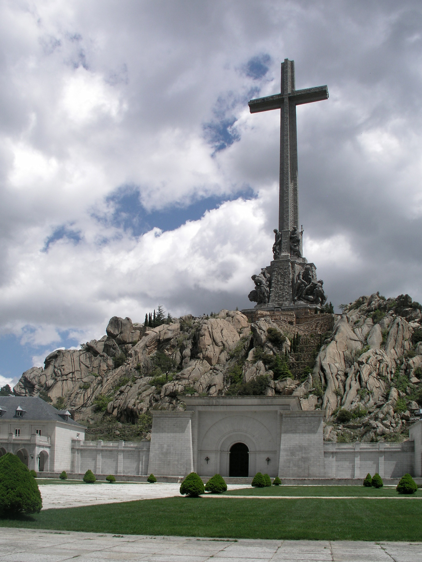 Valle de Los Caidos, Madrid, Spain. Cross, north side.